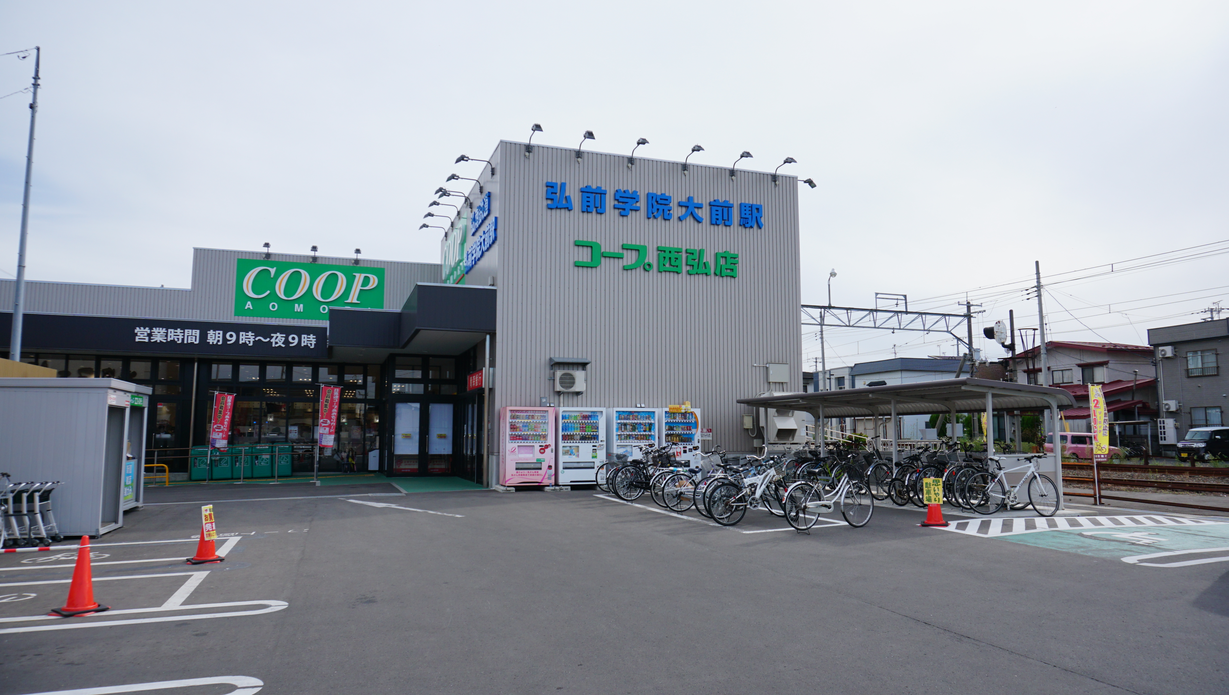 コープあおもり西弘店と弘南鉄道大鰐線・弘前学院大前駅